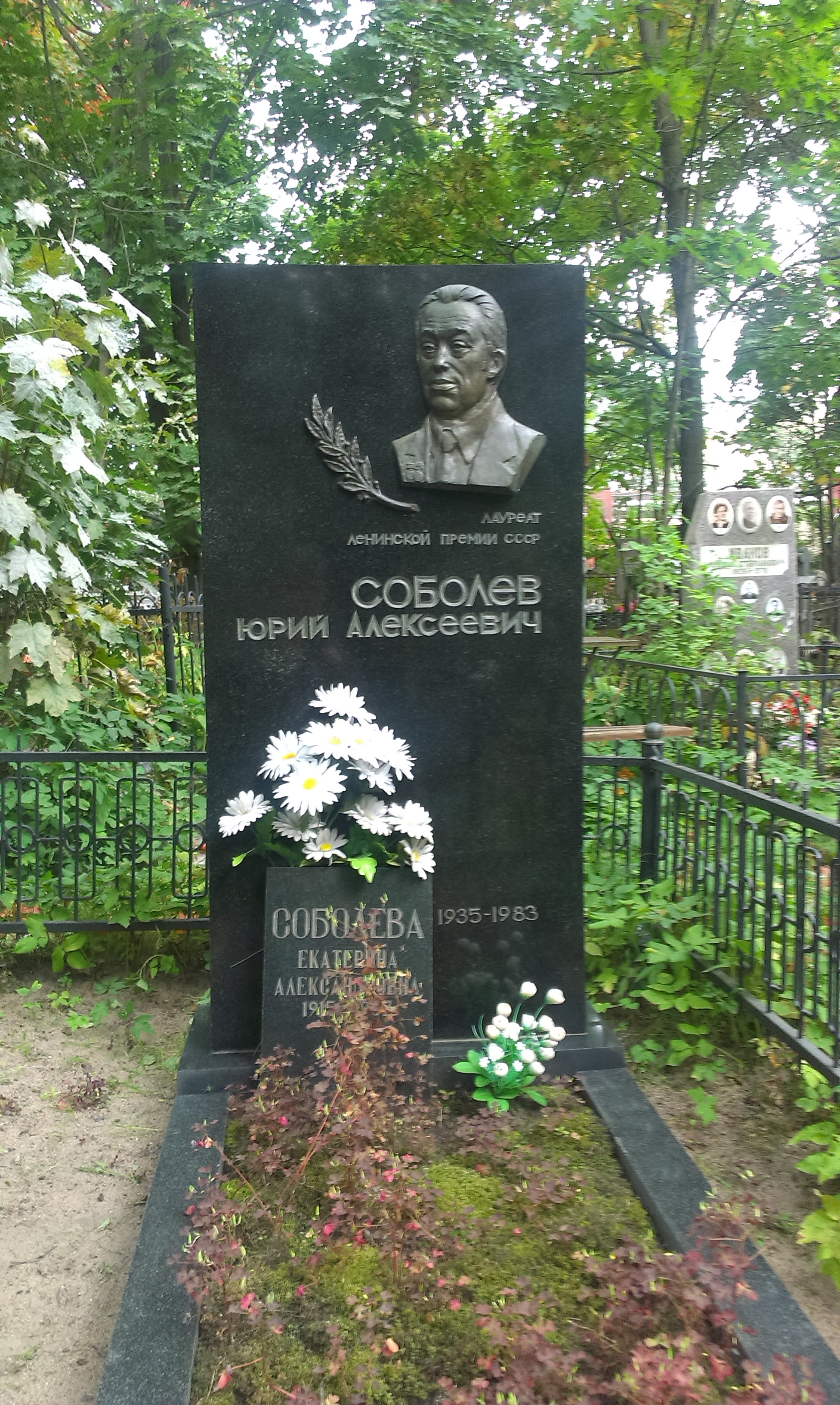 Красненькое кладбище